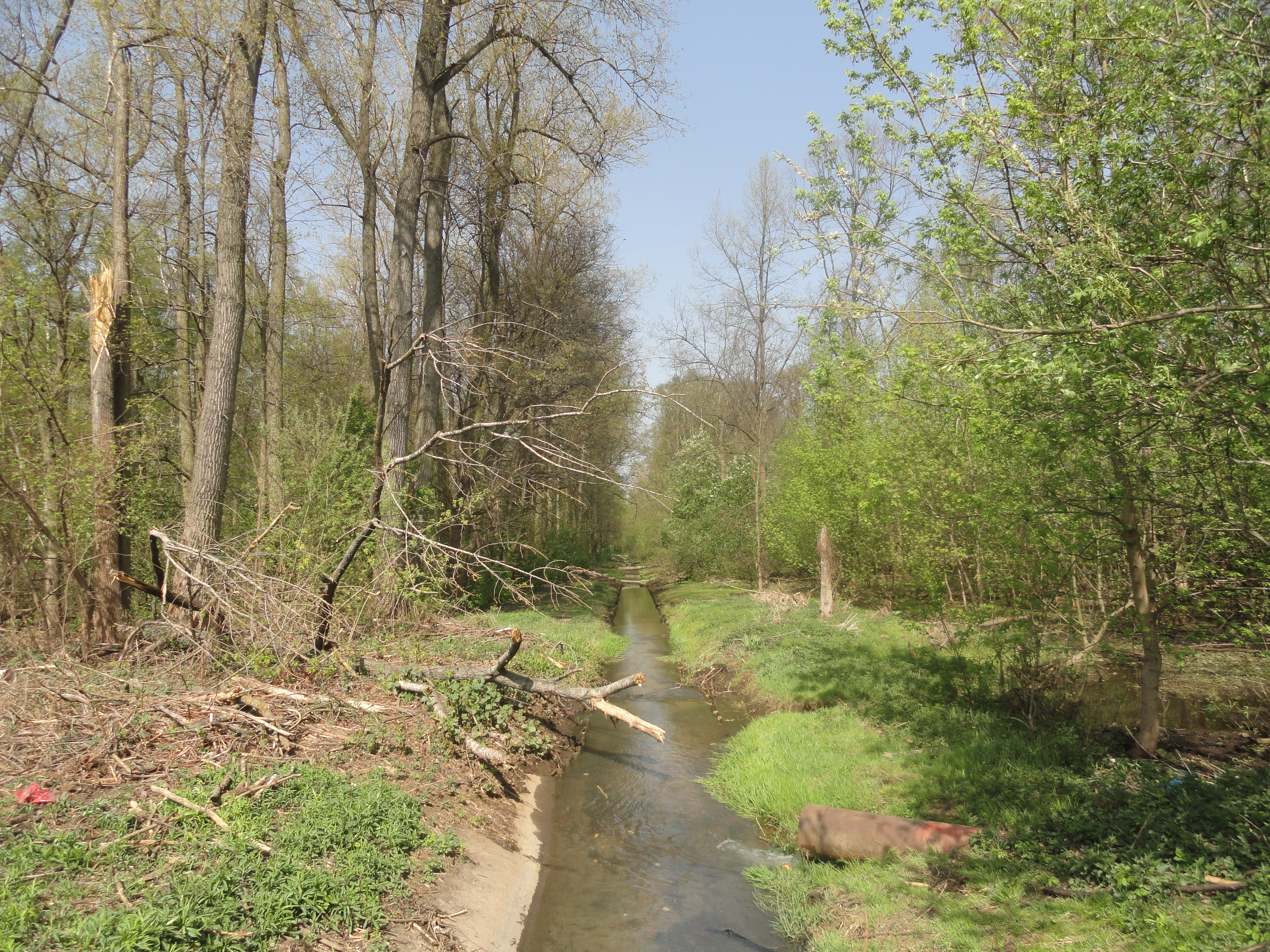 Kanał Bródnowski w lesie na Utracie, widok z ulicy Gwarków na północ